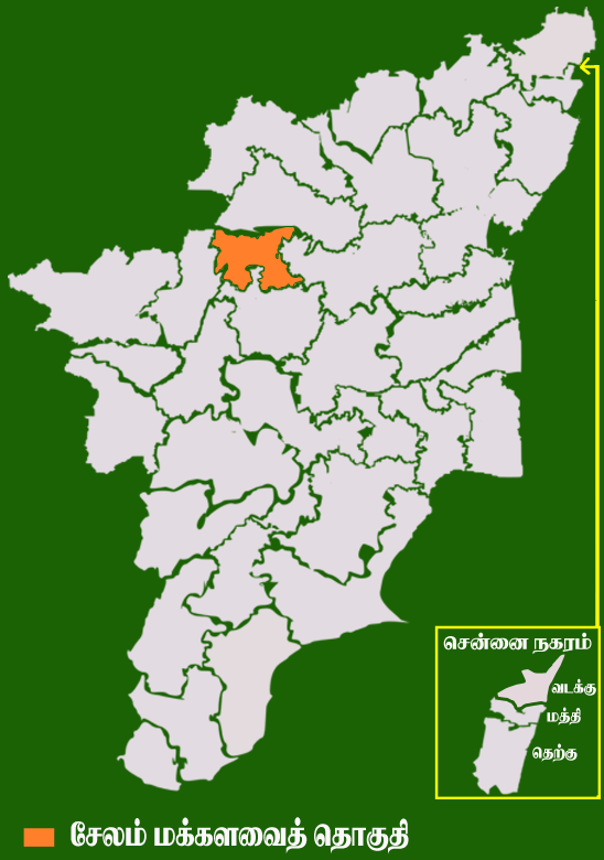 தமிழக வரைபடத்தில் உள்ள சேலம் மக்களவைத் தொகுதி